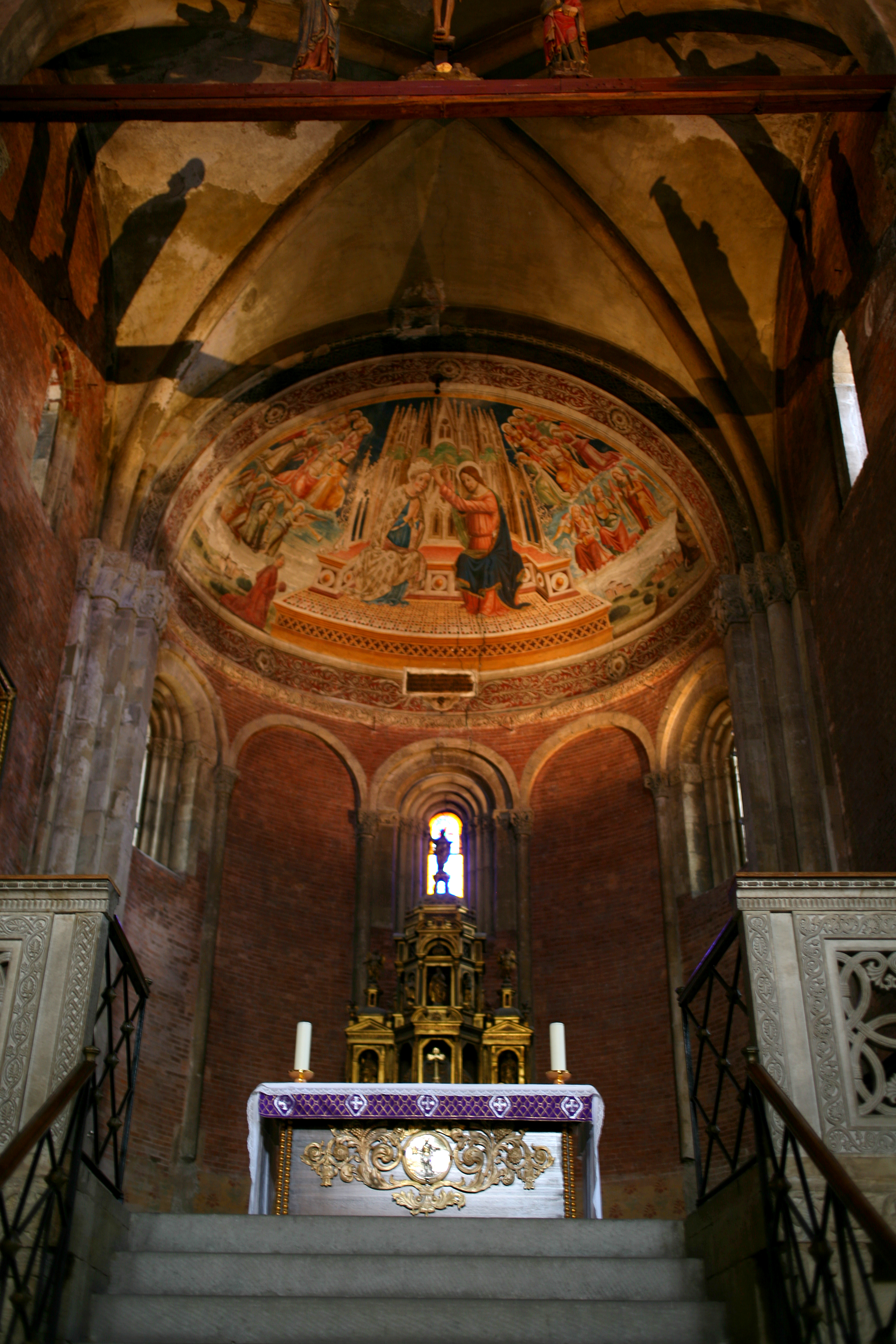 San Michele Maggiore, Pavia, veduta del tiburio